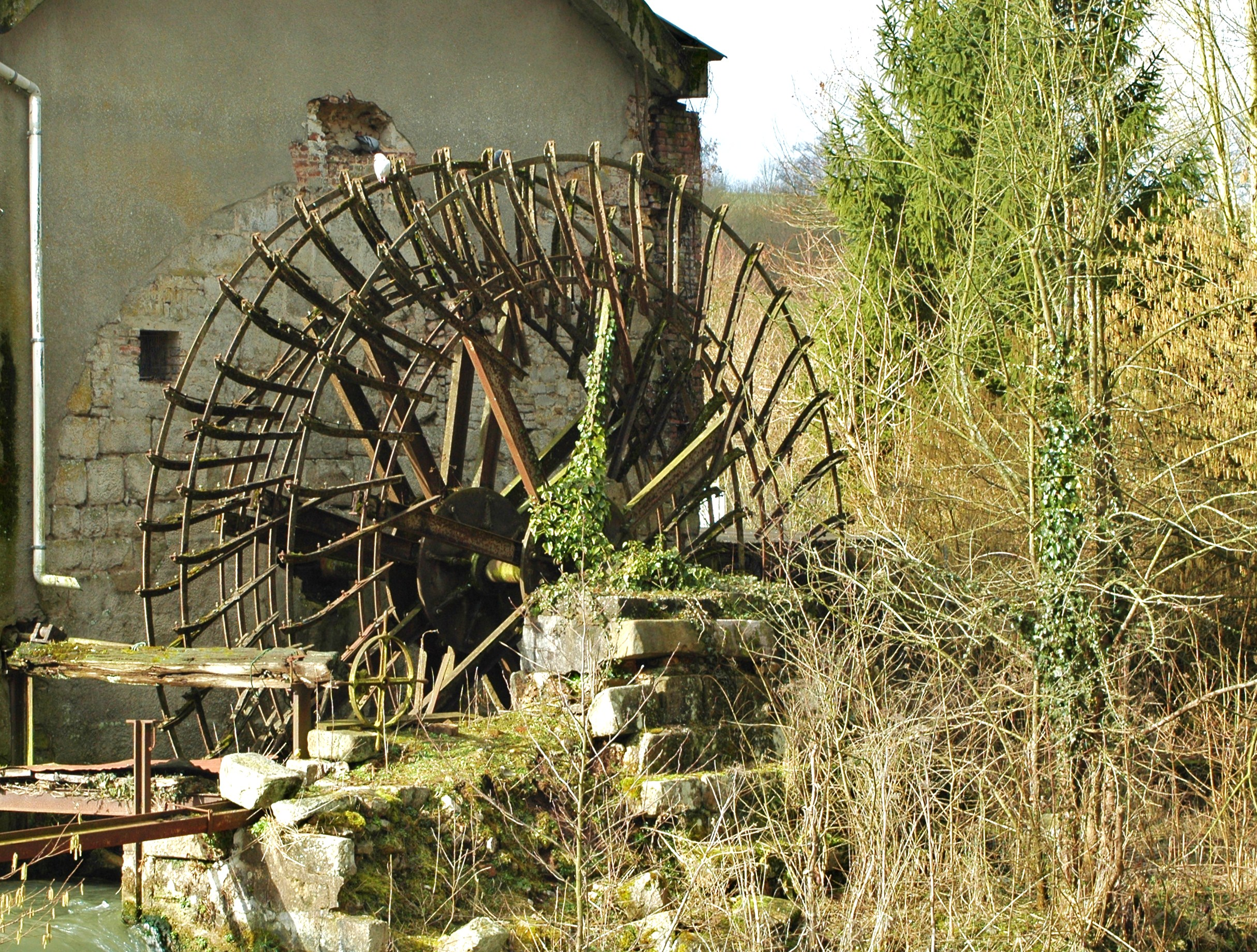 Vieux moulin sur la Durdent. Moulin des Basses Eaux (Grainville-la-Teinturière).